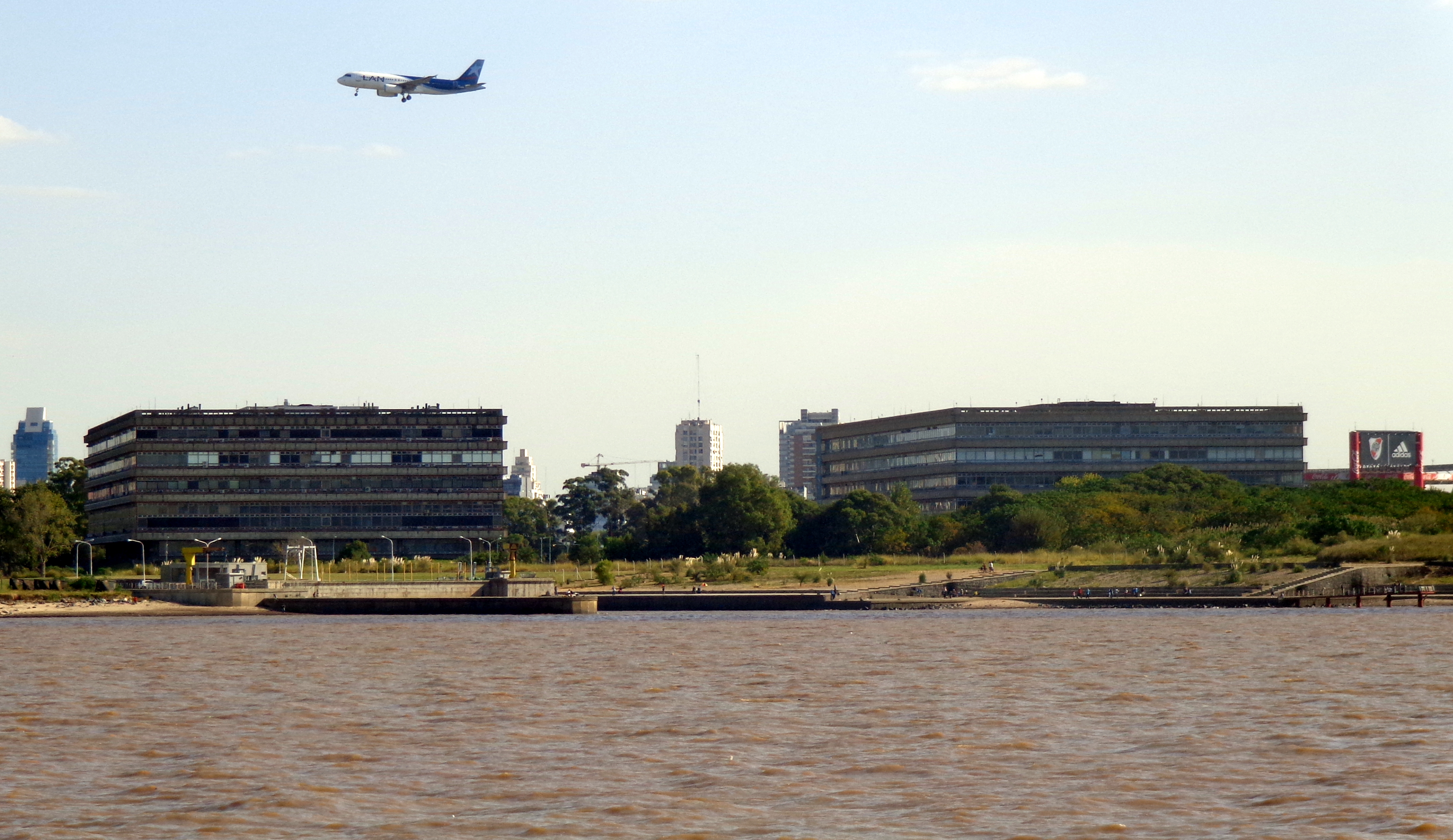 Avión de LAN Argentina cerca de la Ciudad Universitaria, sobre el Río de la Plata, Buenos Aires, Argentina.